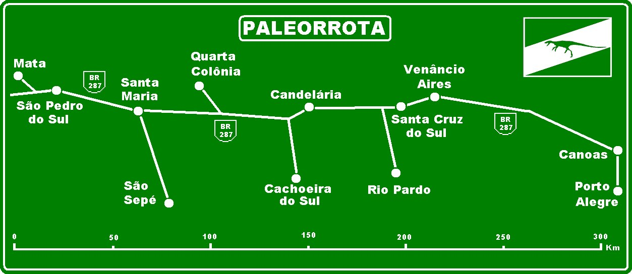 Placa do Geoparque Paleorrota